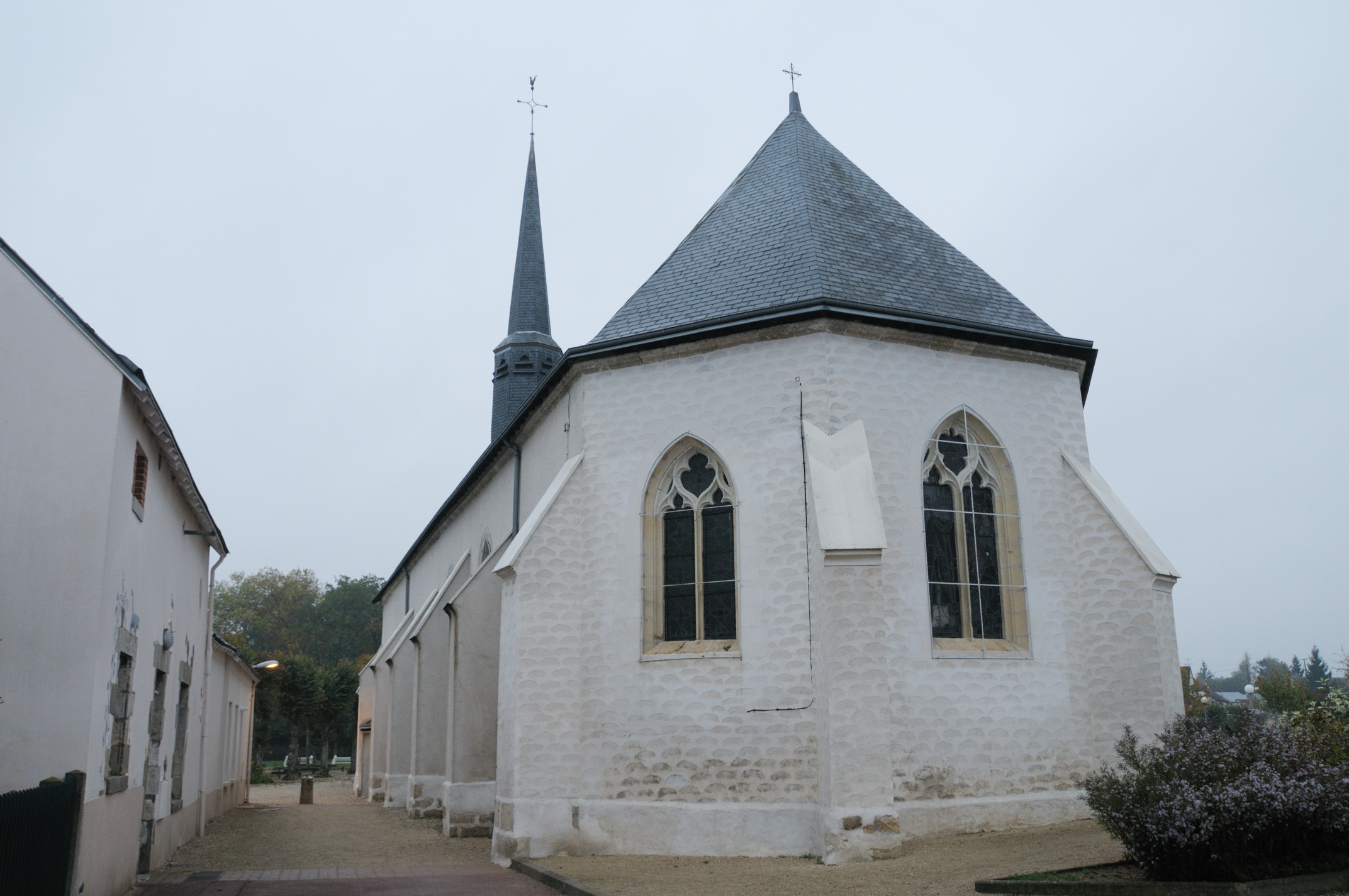 Église Saint-Remi, Chanteau, Loiret, France